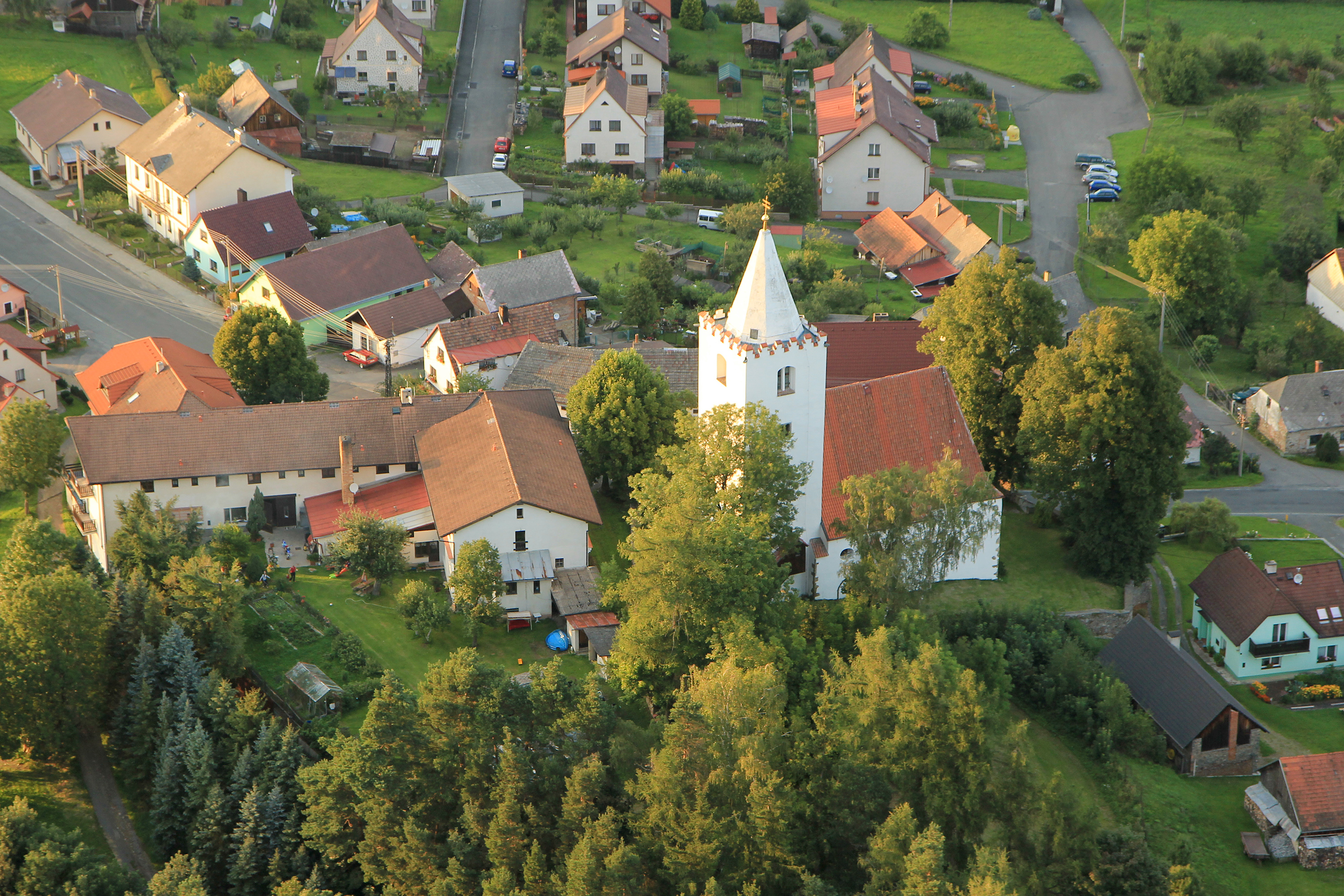 Kostel sv. Petra a Pavla (Petrovice u Sušice), J část obce, Petrovice u Sušice